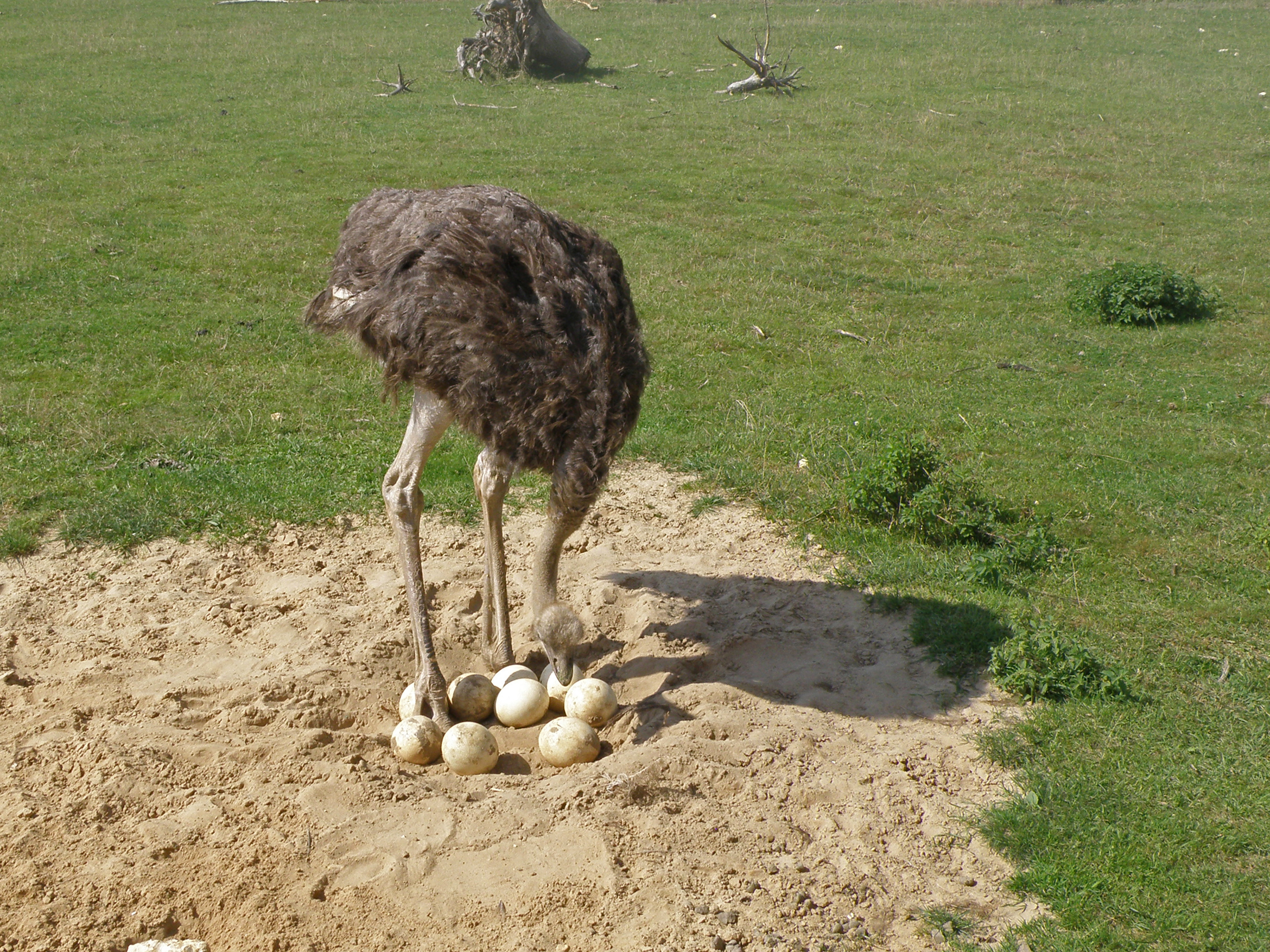 Struś wysiadujący jaja